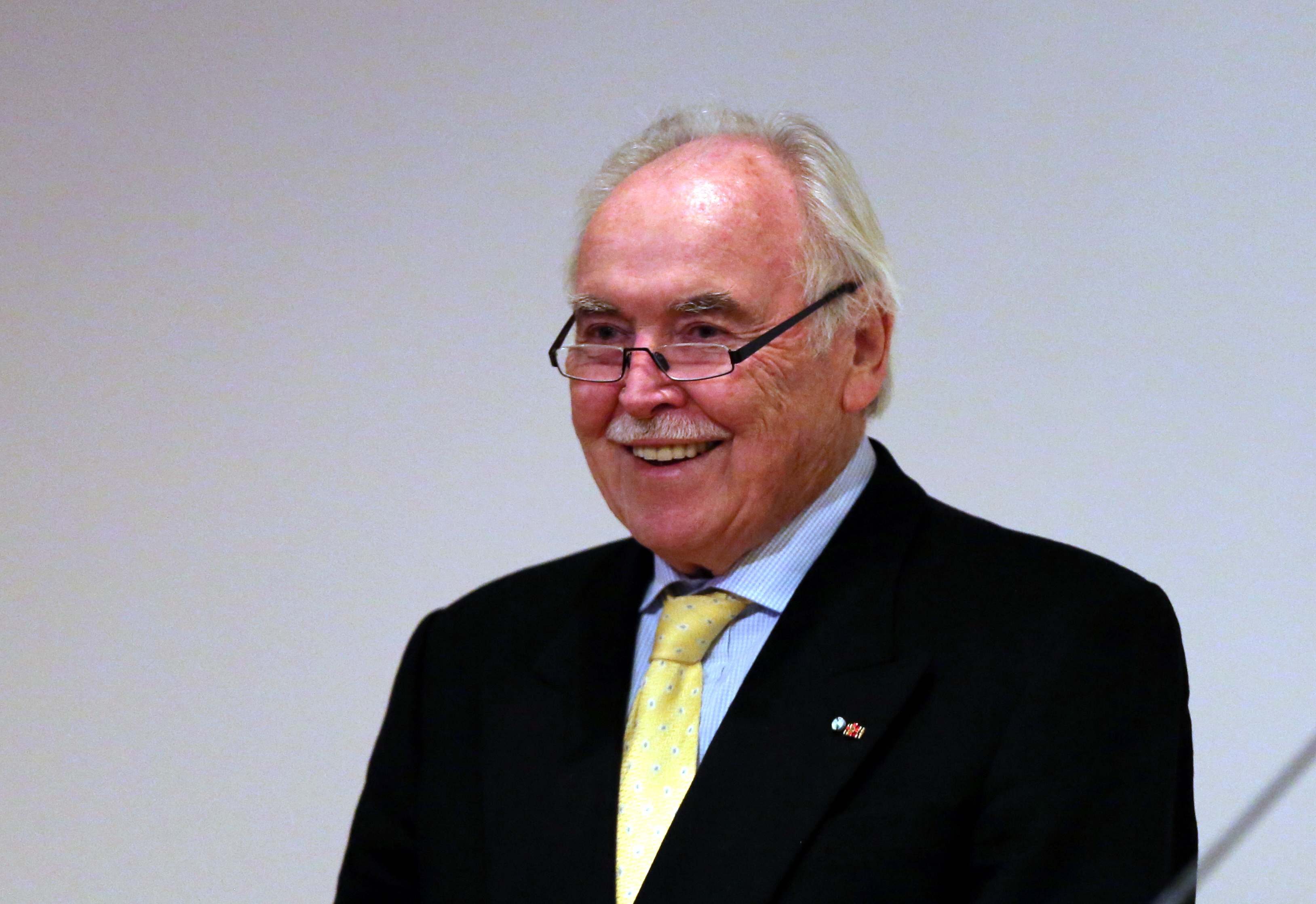 Dieter Hanitzsch bei der Verleihung des Ernst-Hoferichter-Preises 2019 an Dieter Hanitzsch im Münchner Literaturhaus